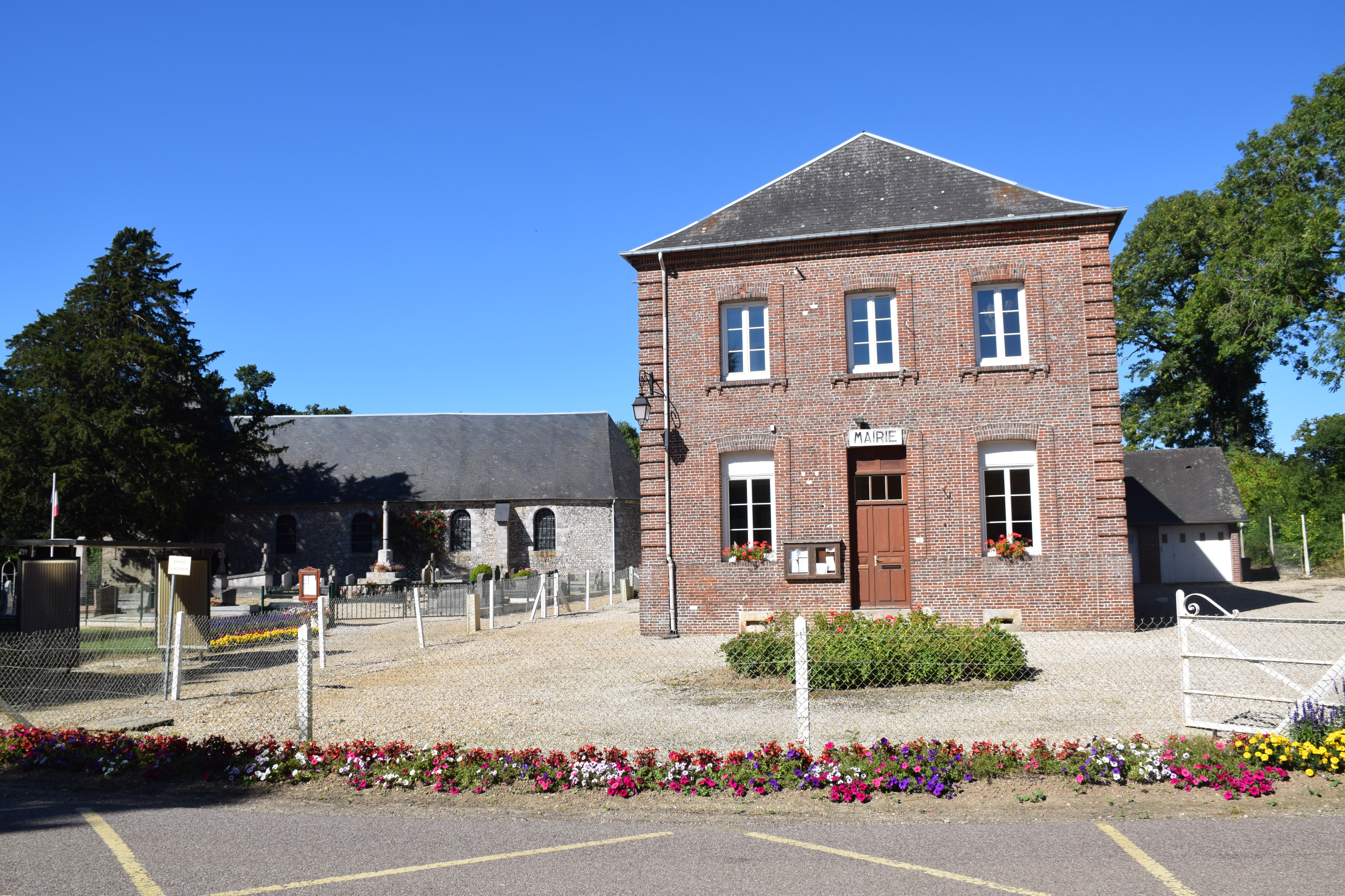 Mairie et église de Reuville Seine Maritime Normandie